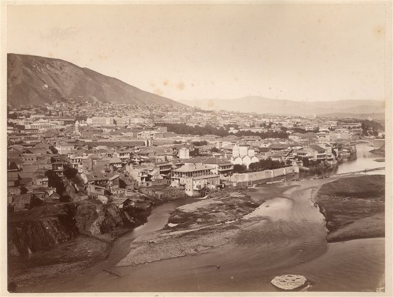 Gruzijos sostinės Tbilisio panorama 1878 m.